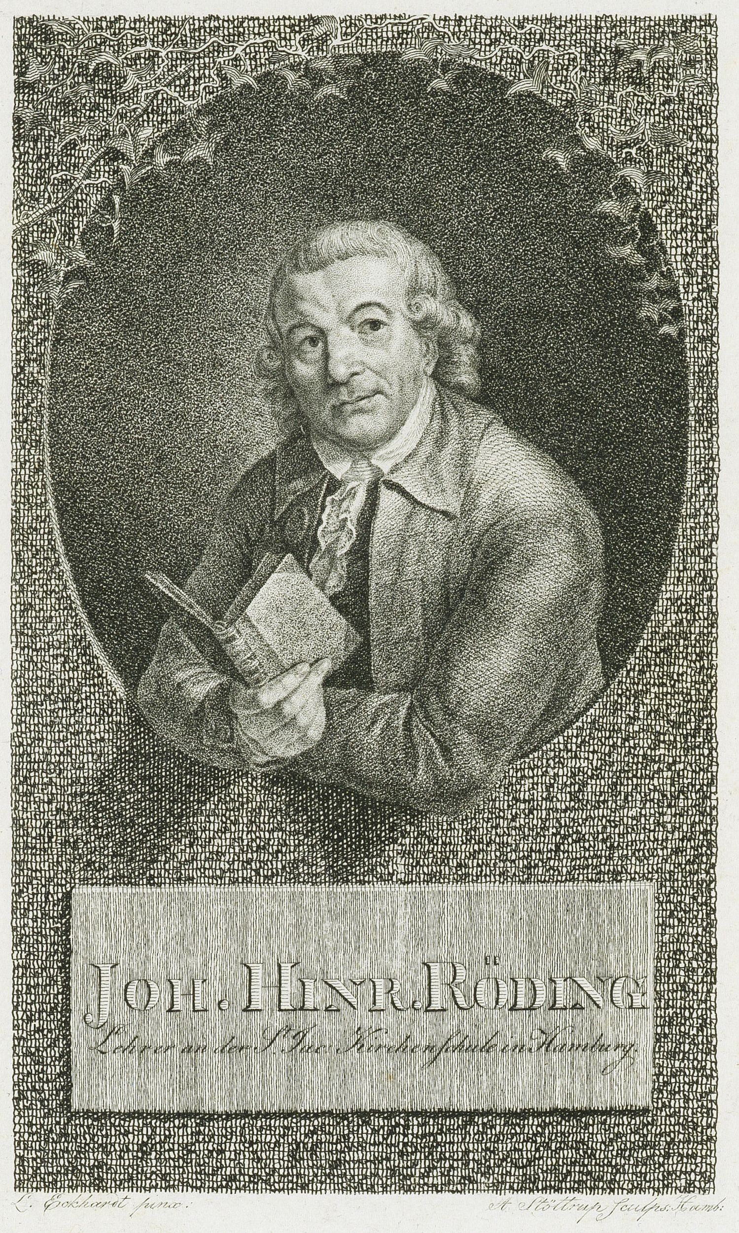 Joh. Hinr. Röding